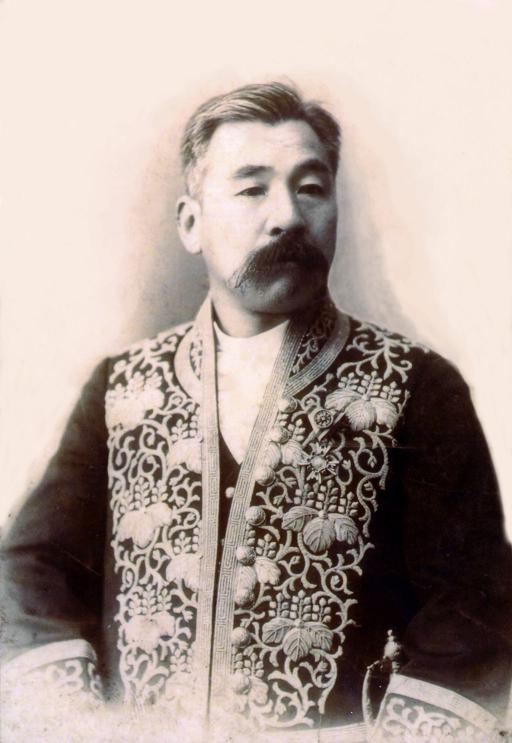 Juntaro takahashi (2 May 1856 - 4 June 1920) 勅任官大礼服姿 帝国大学初代薬理学教授 髙橋順太郎